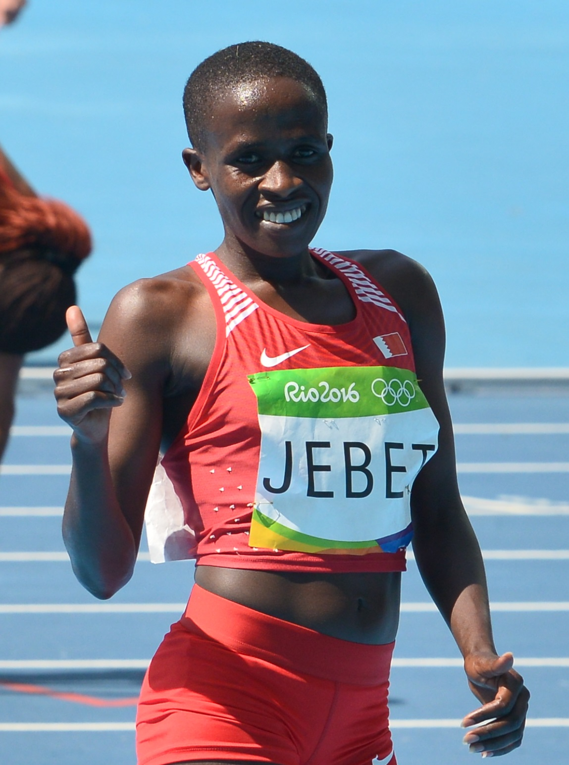 Ruth Jebet juste sa victoire au 3000m steeple des JO de Rio 2016